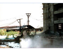 ขณะกำลังก่อสร้างอาคารสิรินธร 1